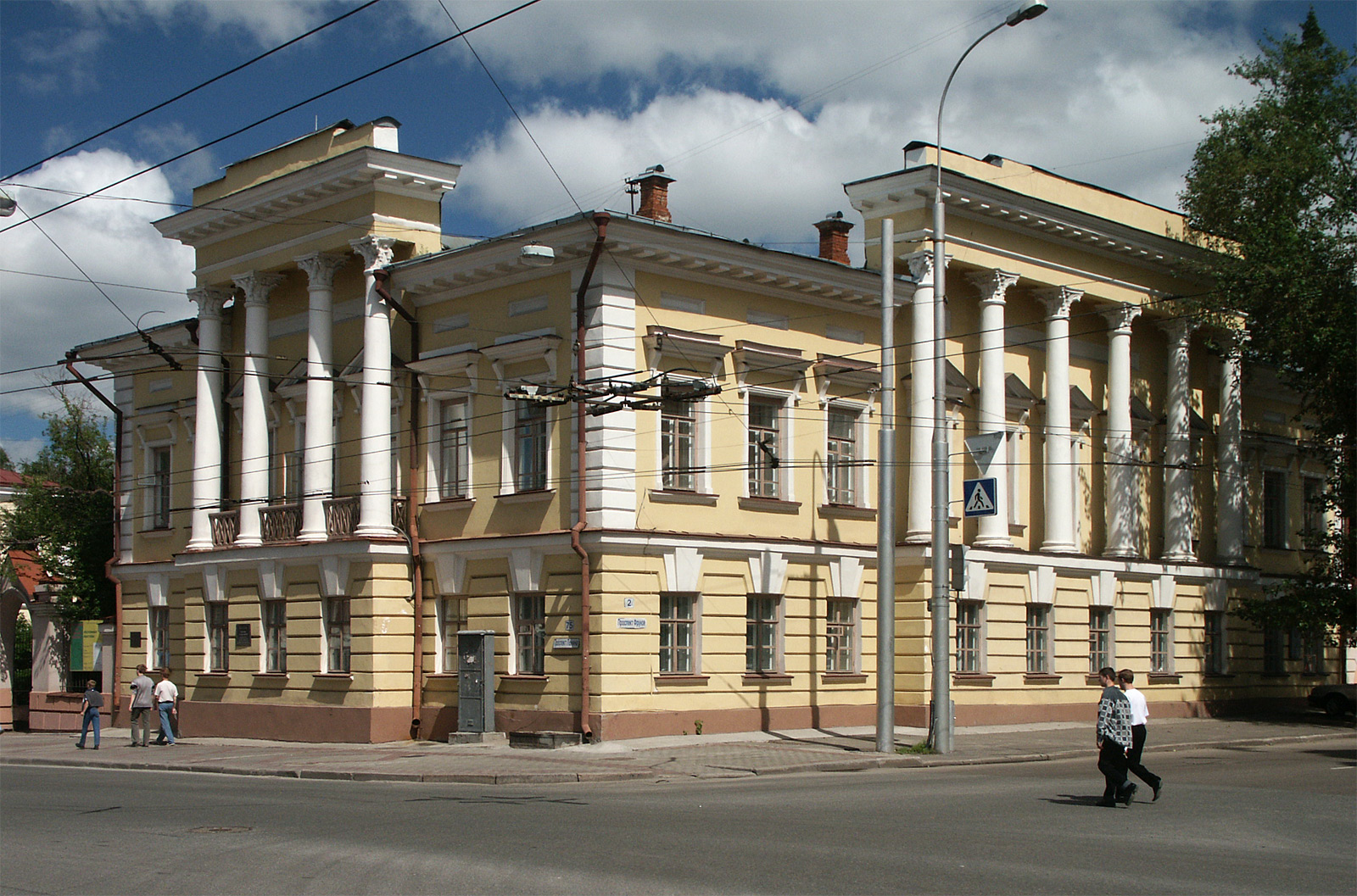 Усадьба Асташева (Томская область, Томск, Ленина проспект, 75-77)